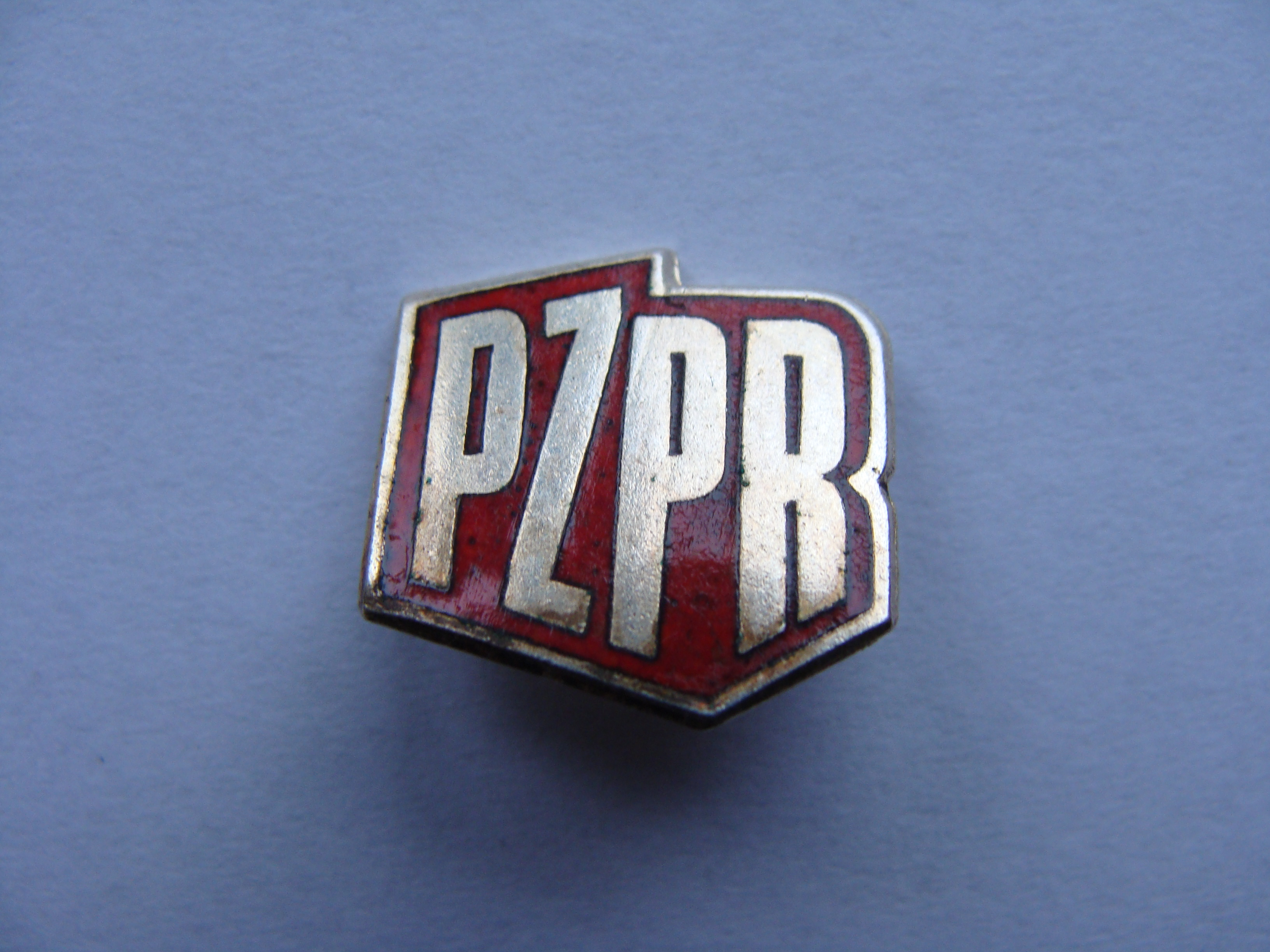 Znaczek PZPR